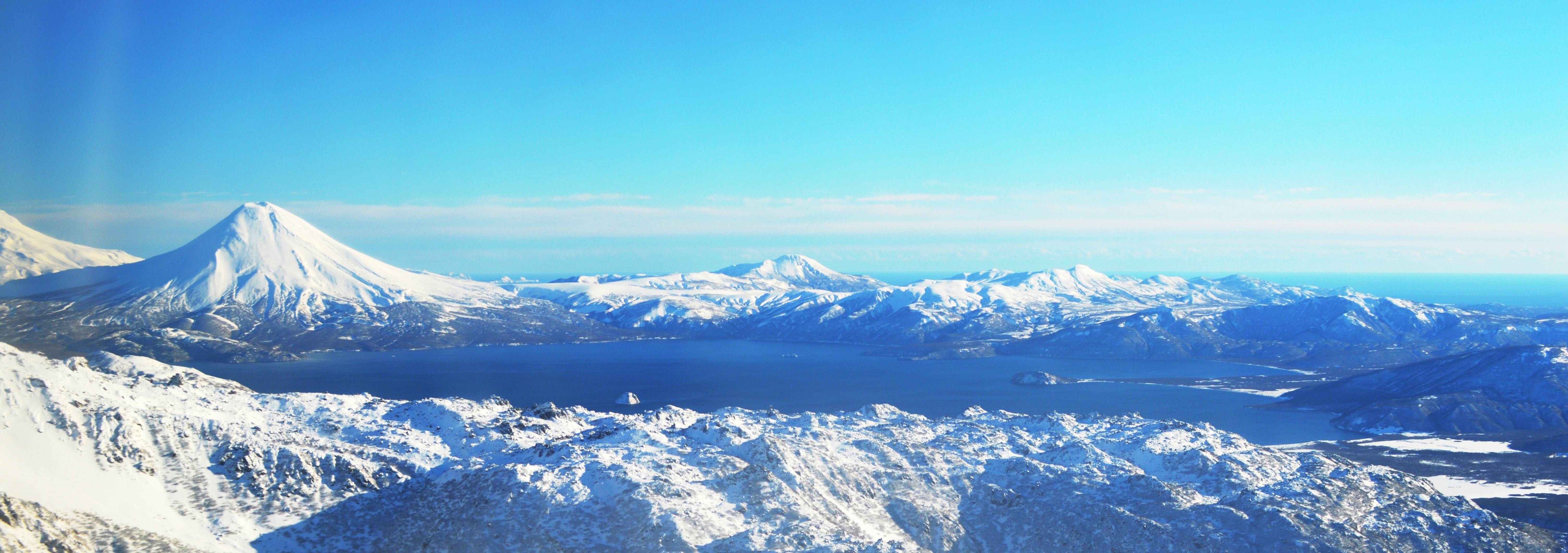 Озеро Курильское: Географические координаты - 51°27’20'‘с.ш., 157°06’00'‘в.д, Усть-Большерецкий район, Камчатский край This image is related to the protected area of Russia number 4110184